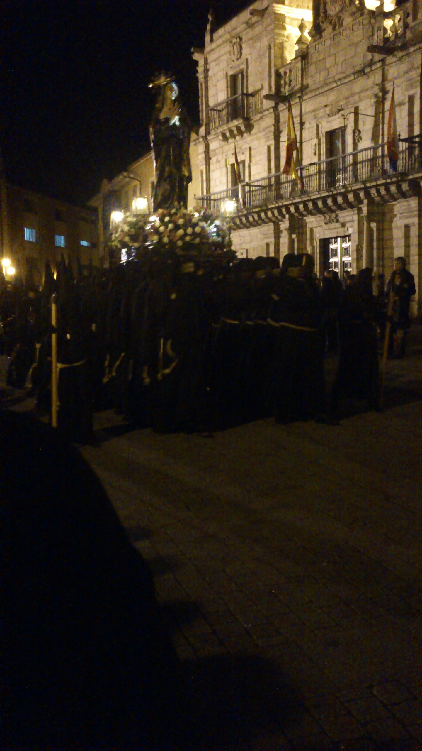 Imagen de la virgen dolorosa en la procesión de los dolores. Semana Santa de Ponferrada 2013